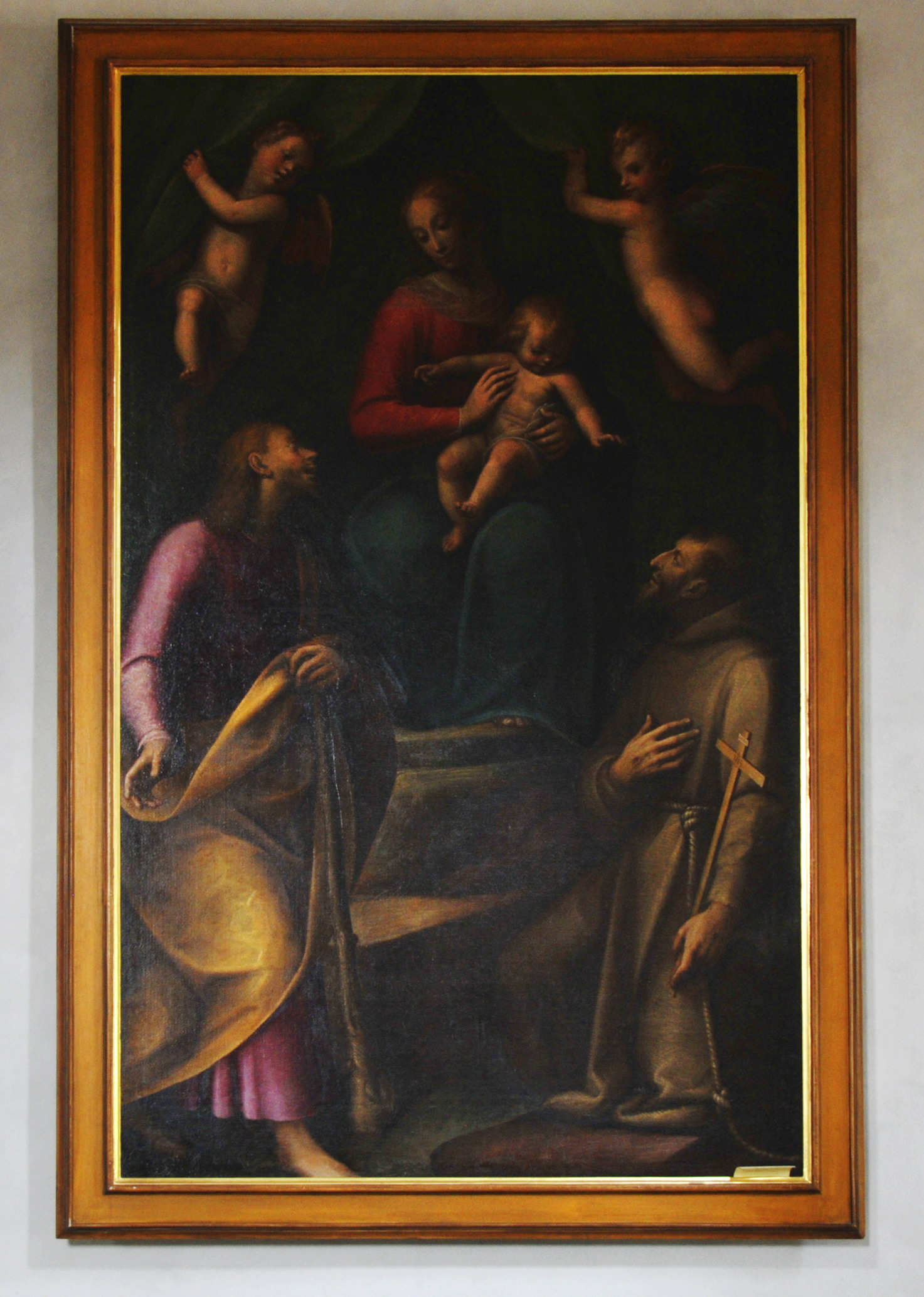 Chiesa parrocchiale di San Siro e casa parrocchiale